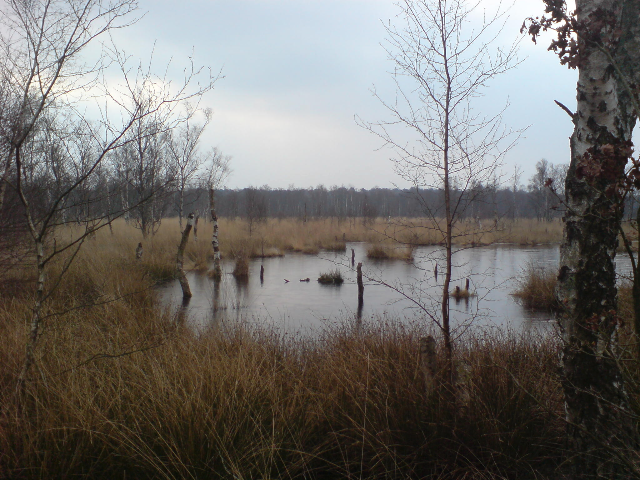 „Wittmoor“, ein Moor bei Henstedt-Ulzburg/Rhen – Landschaftsschutzgebiet „Lütt-Wittmoor“